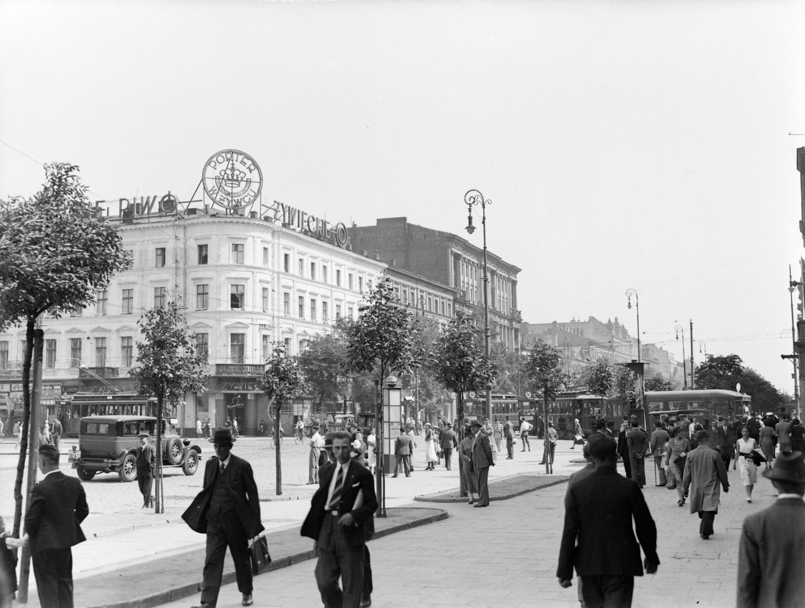 Aleje Jerozolimskie, Warszawa, Polska. Fotografia wykonana w 1934 roku.